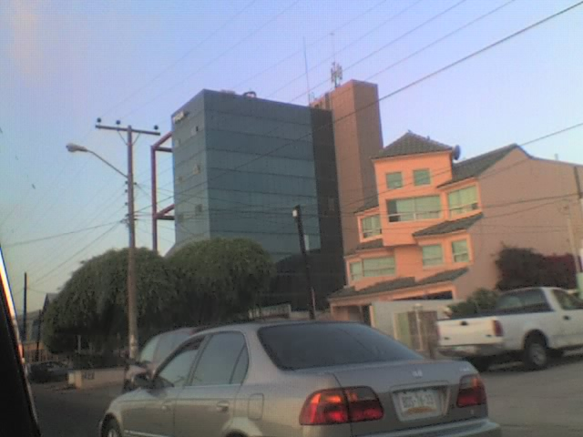 A building in Playas de Tijuana, Tijuana.